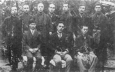 内村鑑三を囲んでの、白雨会送別会